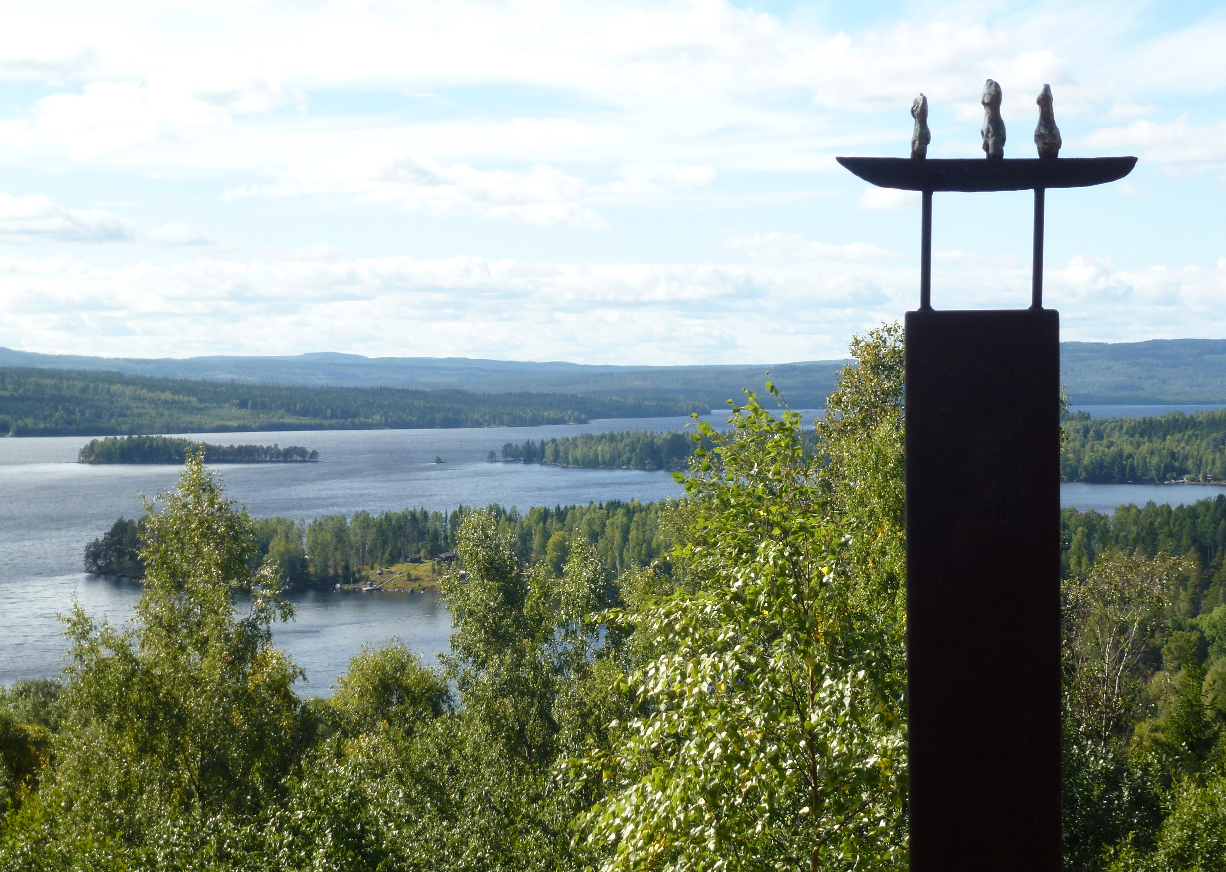 Lekombergs gruva, Hoppets båt av Irene Samuelsson Ohlanders